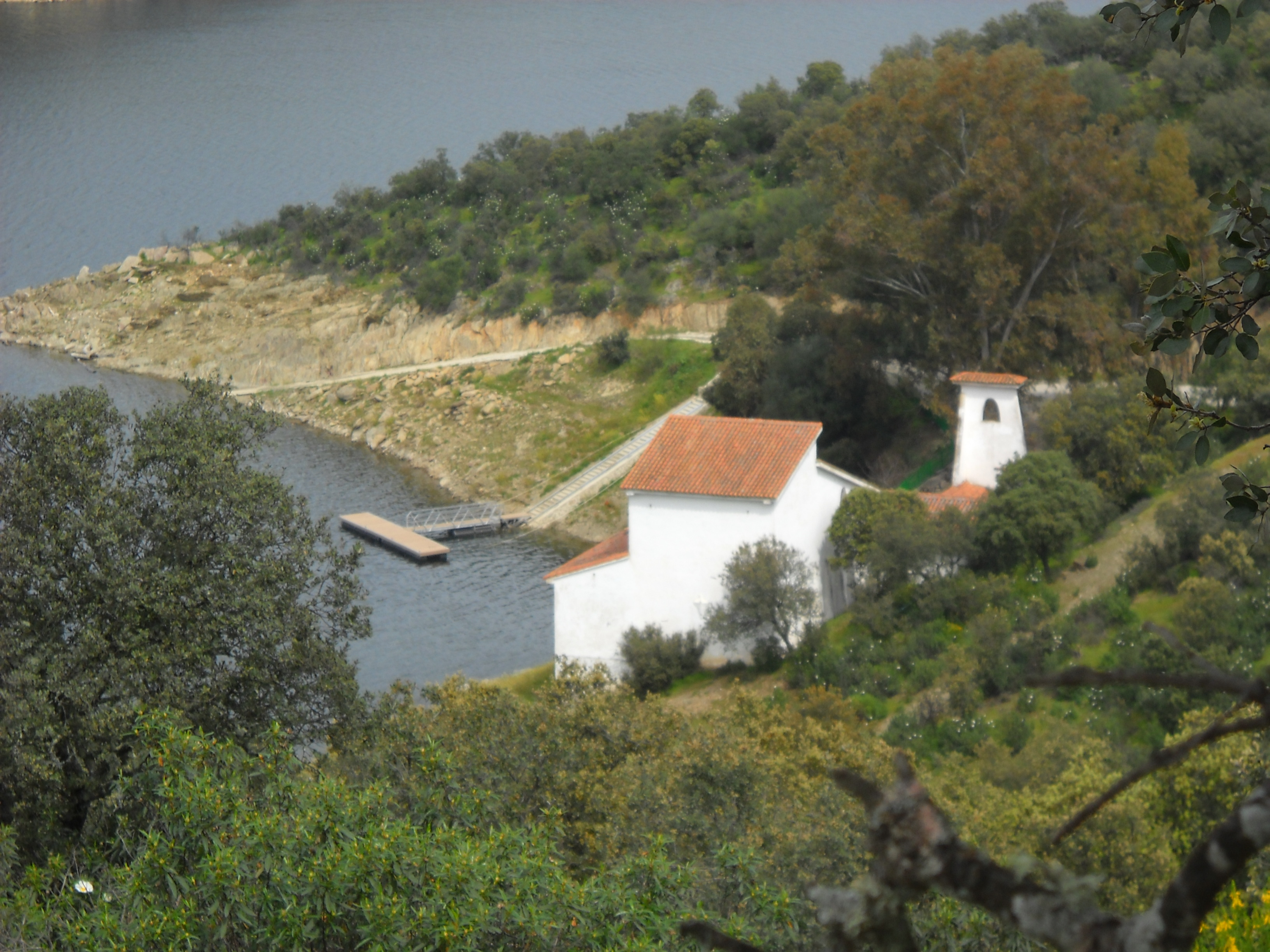 Vista de la Ermita de la Virgen del Río y del embarcadero deportivo sobre el río Tajo en Talaván (Extremadura, España)